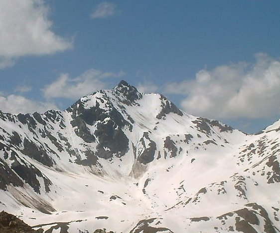 Löcherkogel von Osten